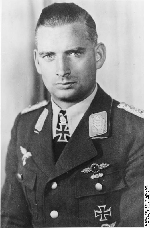 Oberst Hajo Herrmann Träger des Eichenlaubes mit Schwerten zum Ritterkreuz des Eisernen Kreuzes Inspekteur in der deutschen Luftverteidigung. Herausgabe-Datum: 5.2.1944